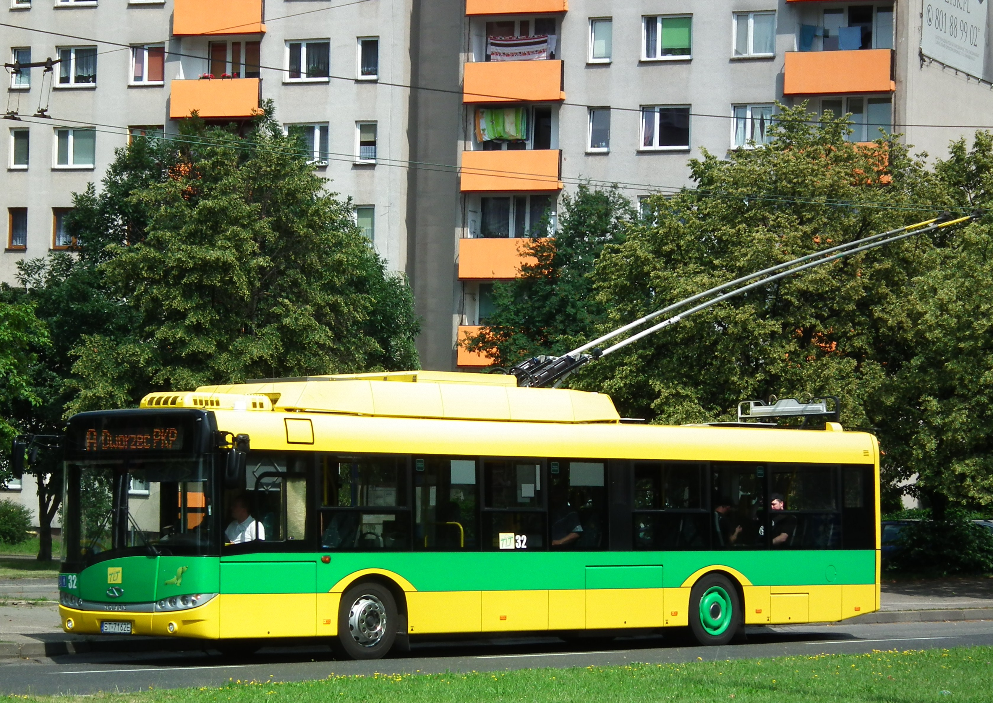 Tyskie trolejbusy.